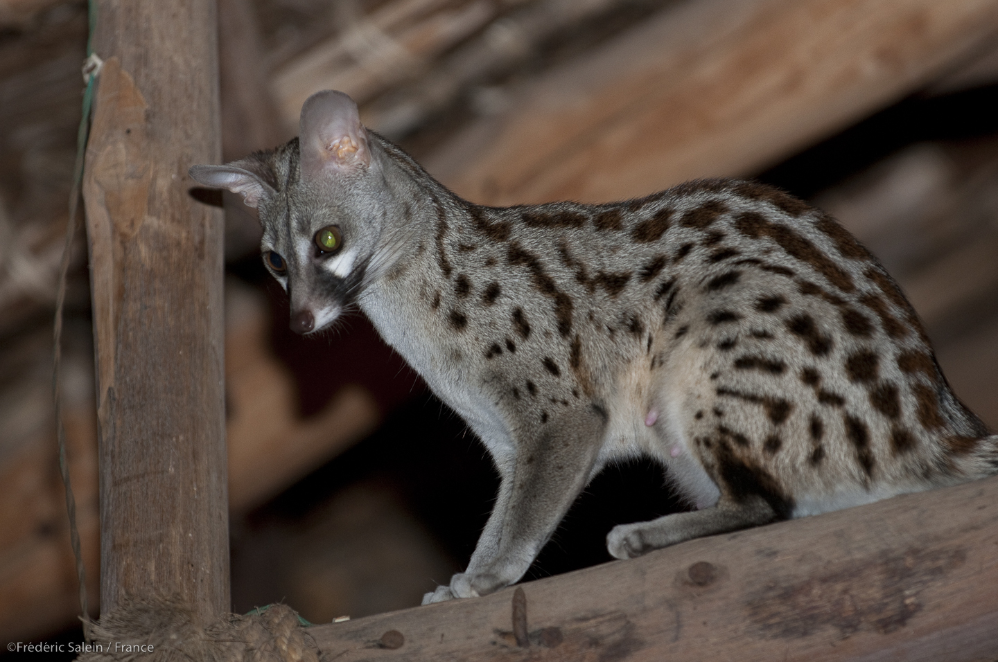 Genette commune, salle de restaurant, Satao Camp A female common genet in the dining room, Satao Camp